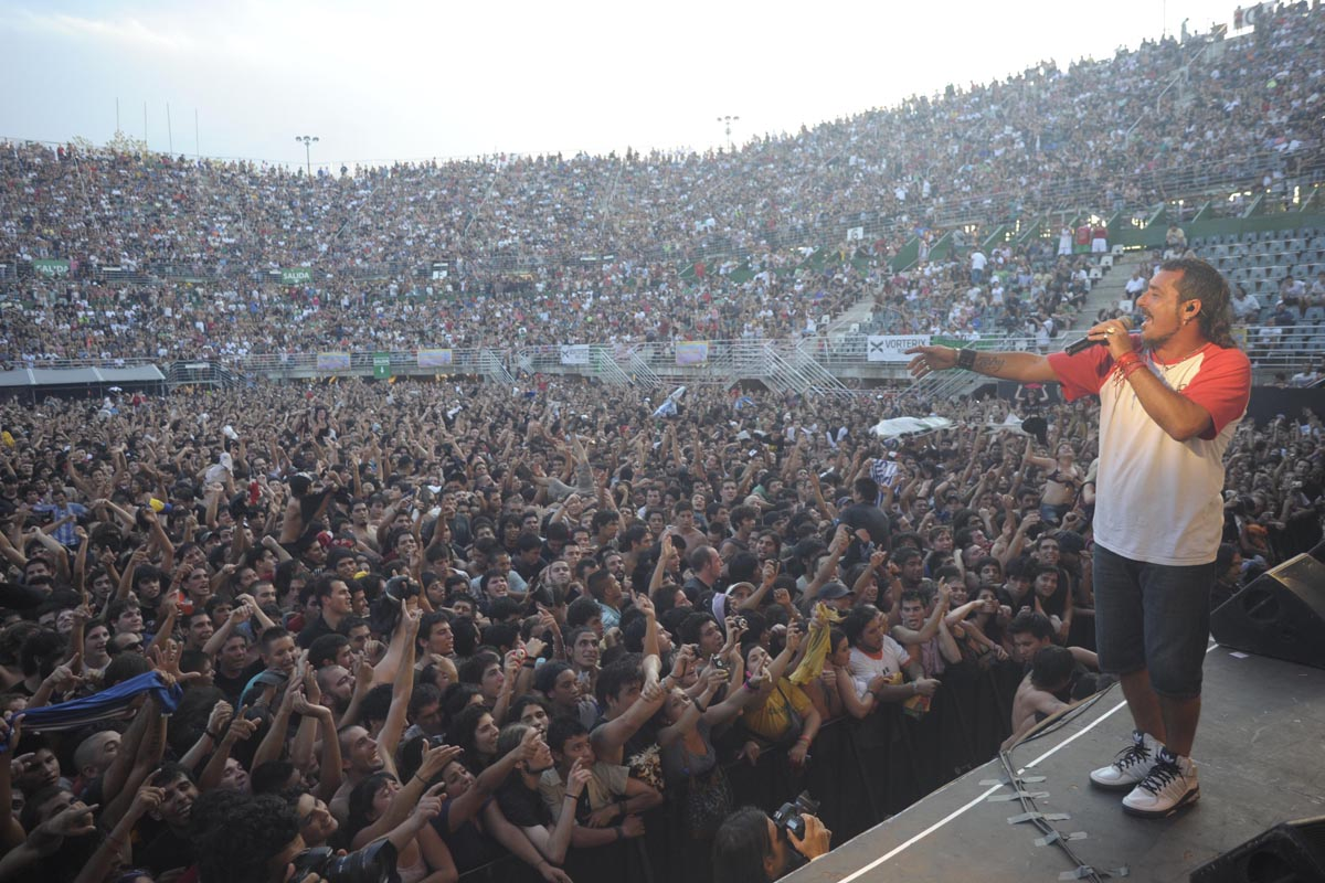 El sábado, ante más de 15 mil personas se presentaron Las Pelotas. ( Foto: Federico Hamilton)